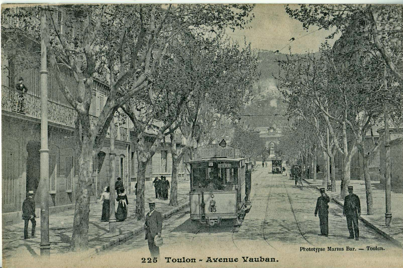 Carte postale ancienne éditée par Marius Bar, n°225 : TOULON - Avenue Vauban